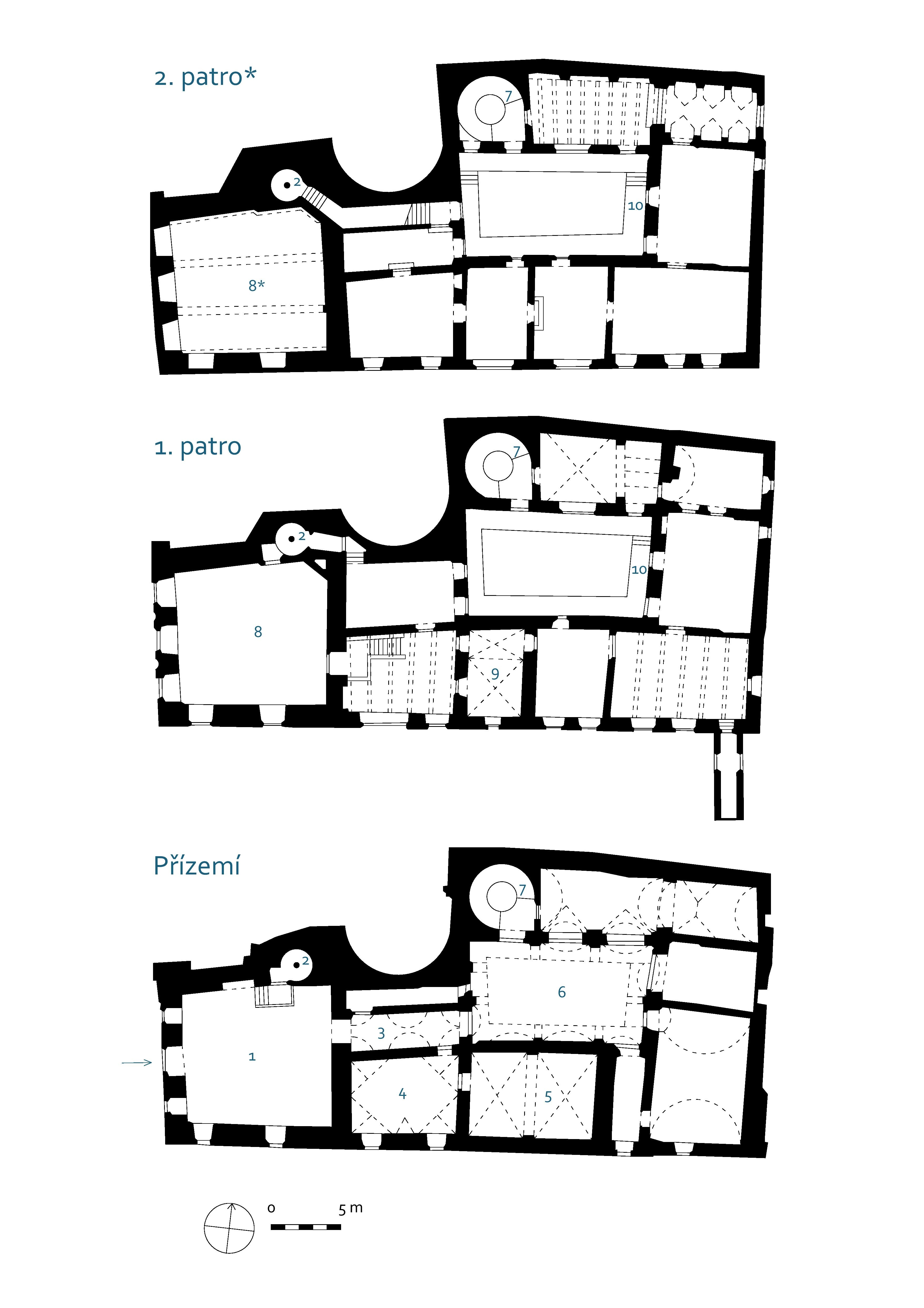 Půdorysy podlaží domu U Kamenného zvonu: 1 Vstupní síň 2 Malé točité schodiště 3 Průchod do dvora 4 Předkaplí 5 Dolní kaple 6 Dvůr 7 Velké točité schodiště 8 Sál v prvním patře věže 9 Soukromá kaple 10 Pavlač Půdorysný řez druhého patra rezidenčních místností zasahuje stále do sálu prvního patra věže.